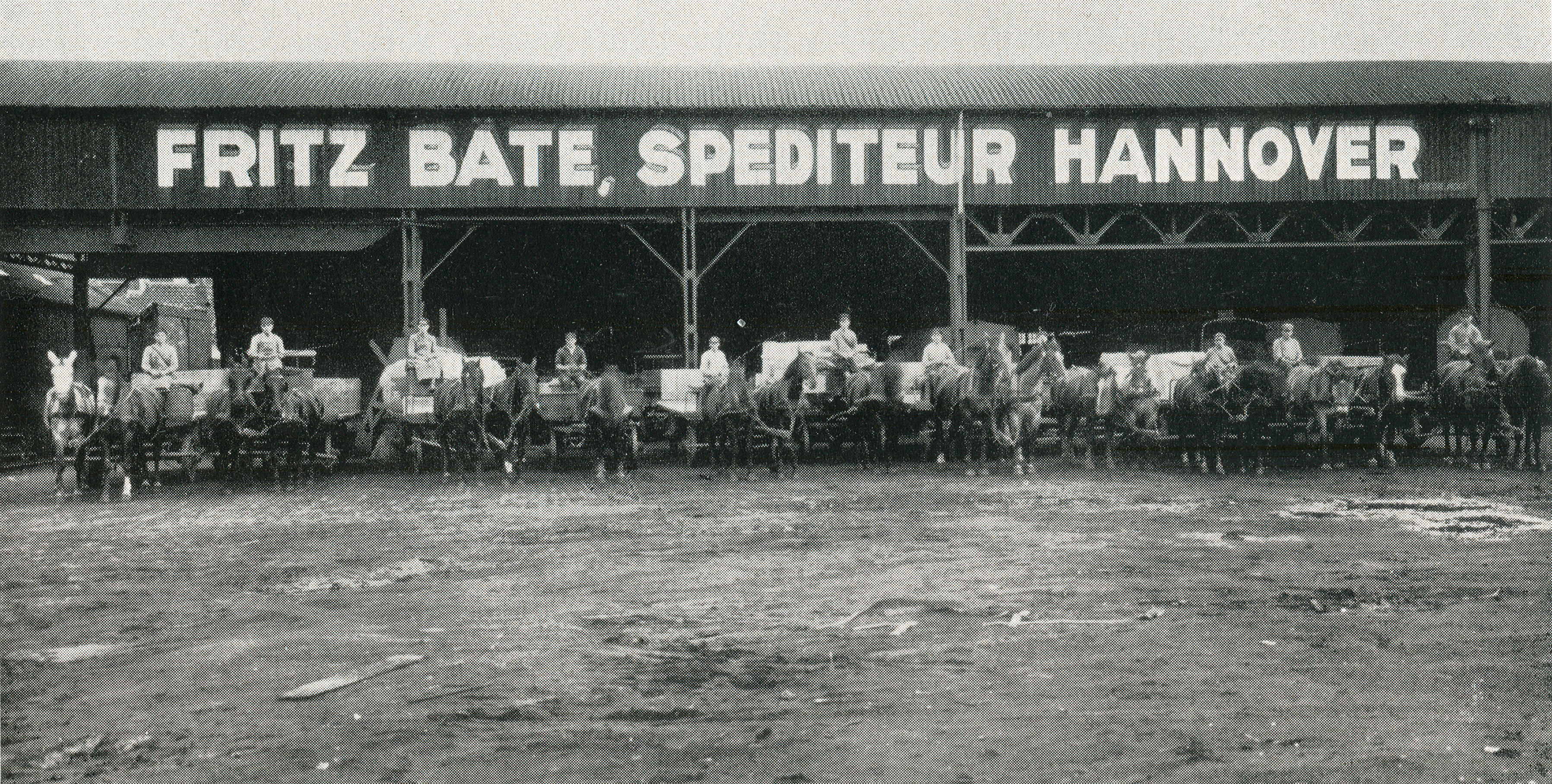 Punktgerasteter Abdruck einer Fotografie um 1900, die die Spedtion Bäte in Hannover, hier noch in der Bachstraße 3 in der Nordstadt zeigt. Zu sehen sind mehr als 10 zumeist offene Pferdefuhrwerke, in der Regel als Zweispänner, und ihre Kutscher auf einem der Höfe des Unternehmens ...